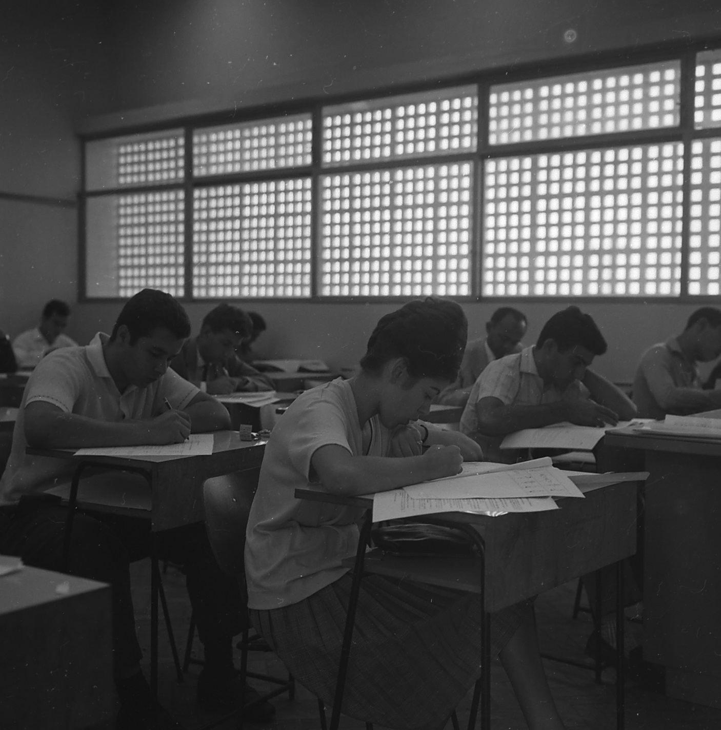 Imagem do Fundo Agência Nacional, do Arquivo Nacional